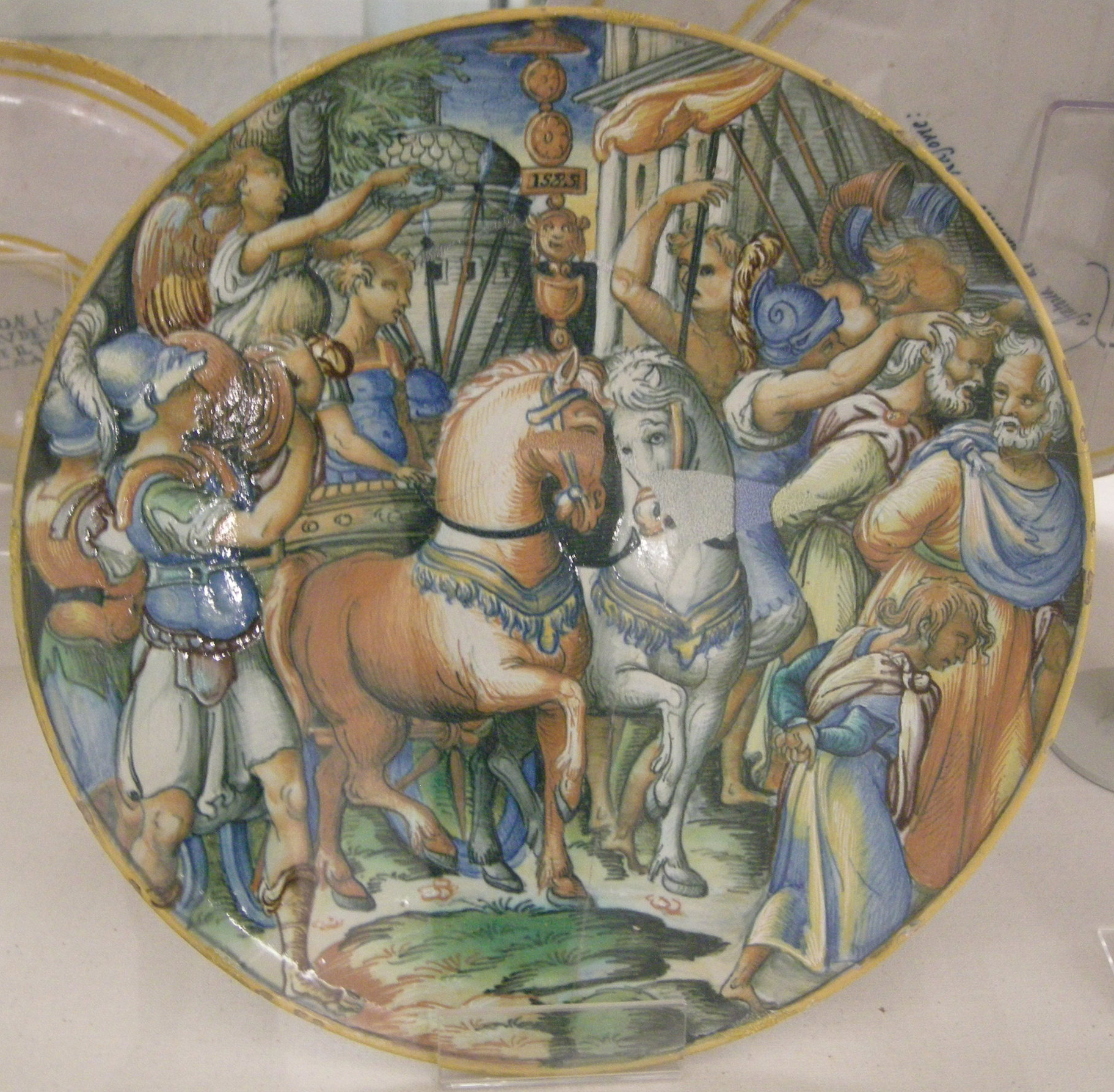 Maiolica di urbino, francesco Maria I della rovere e maldonato, 1550-1580 ca.